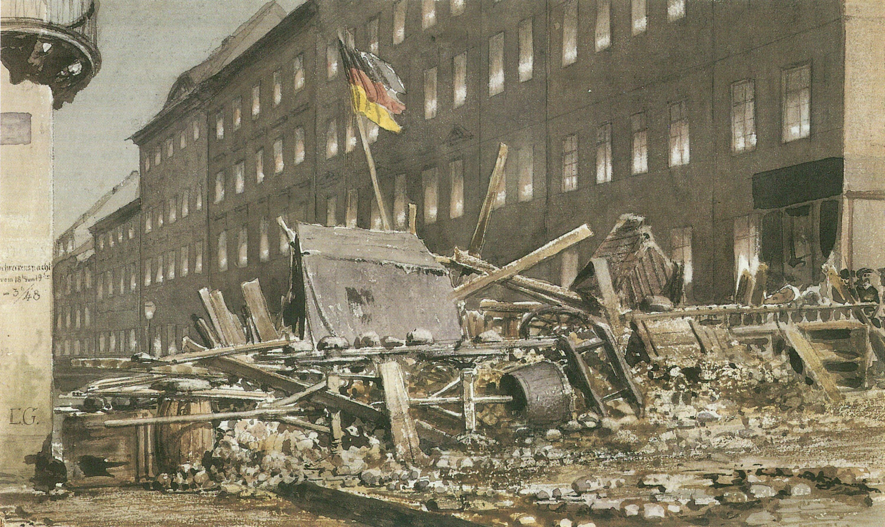 Баррикада на Брайте штрассе